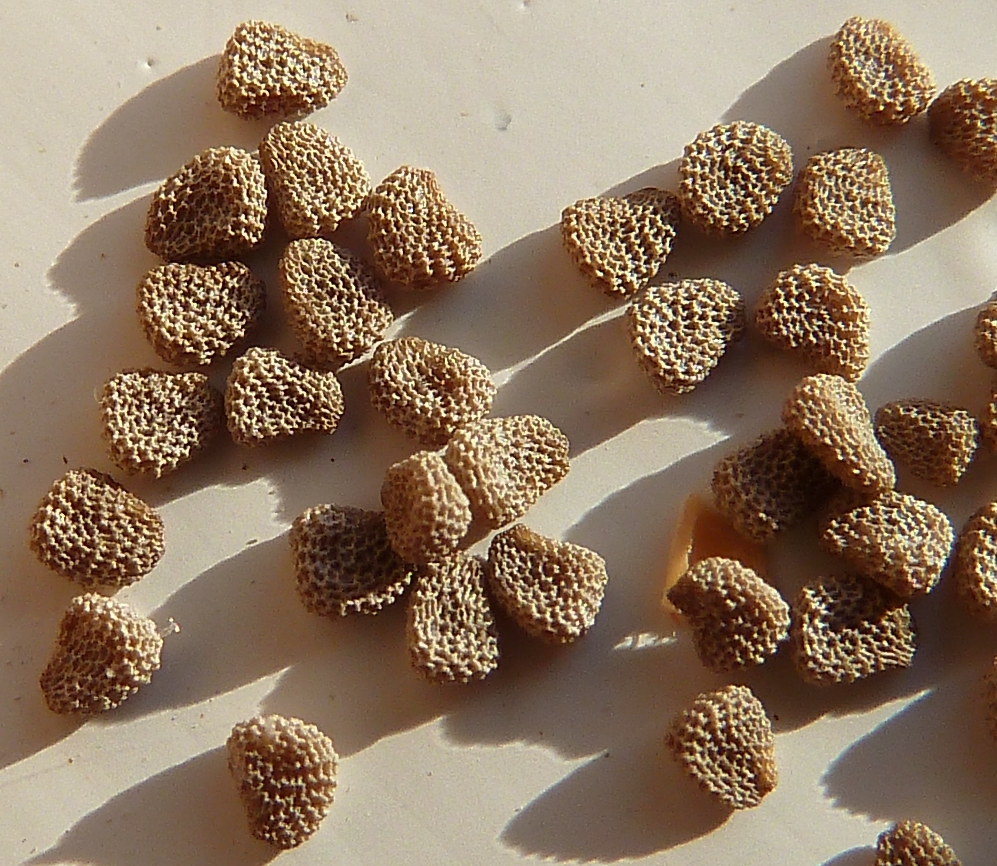 Hyoscyamus albus (Beleño) : semillas sueltas - Calle del Puerto de Poniente, Águilas (Provincia de Murcia, España).